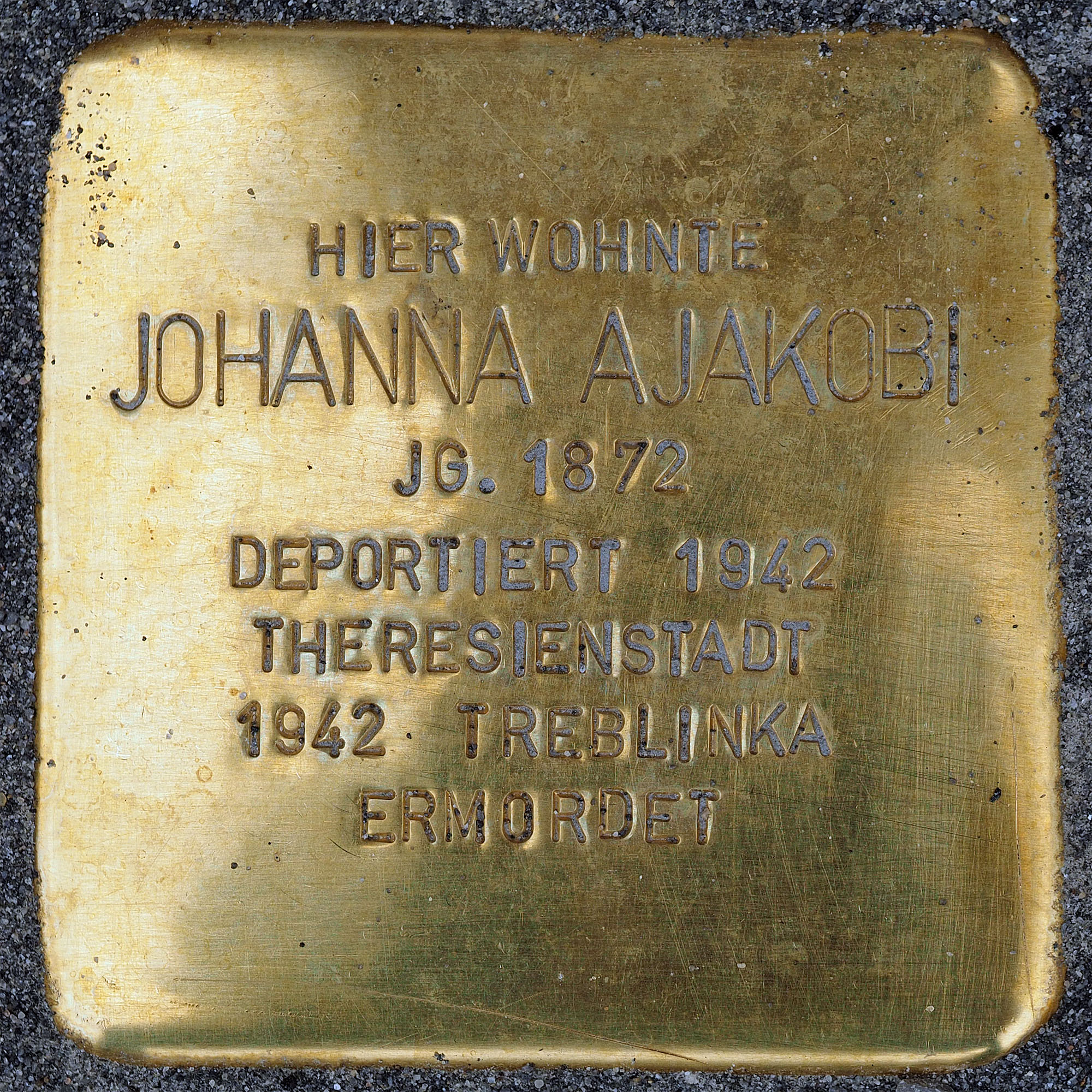 Stolpersteine Kempen: Ajakobi, Johanna